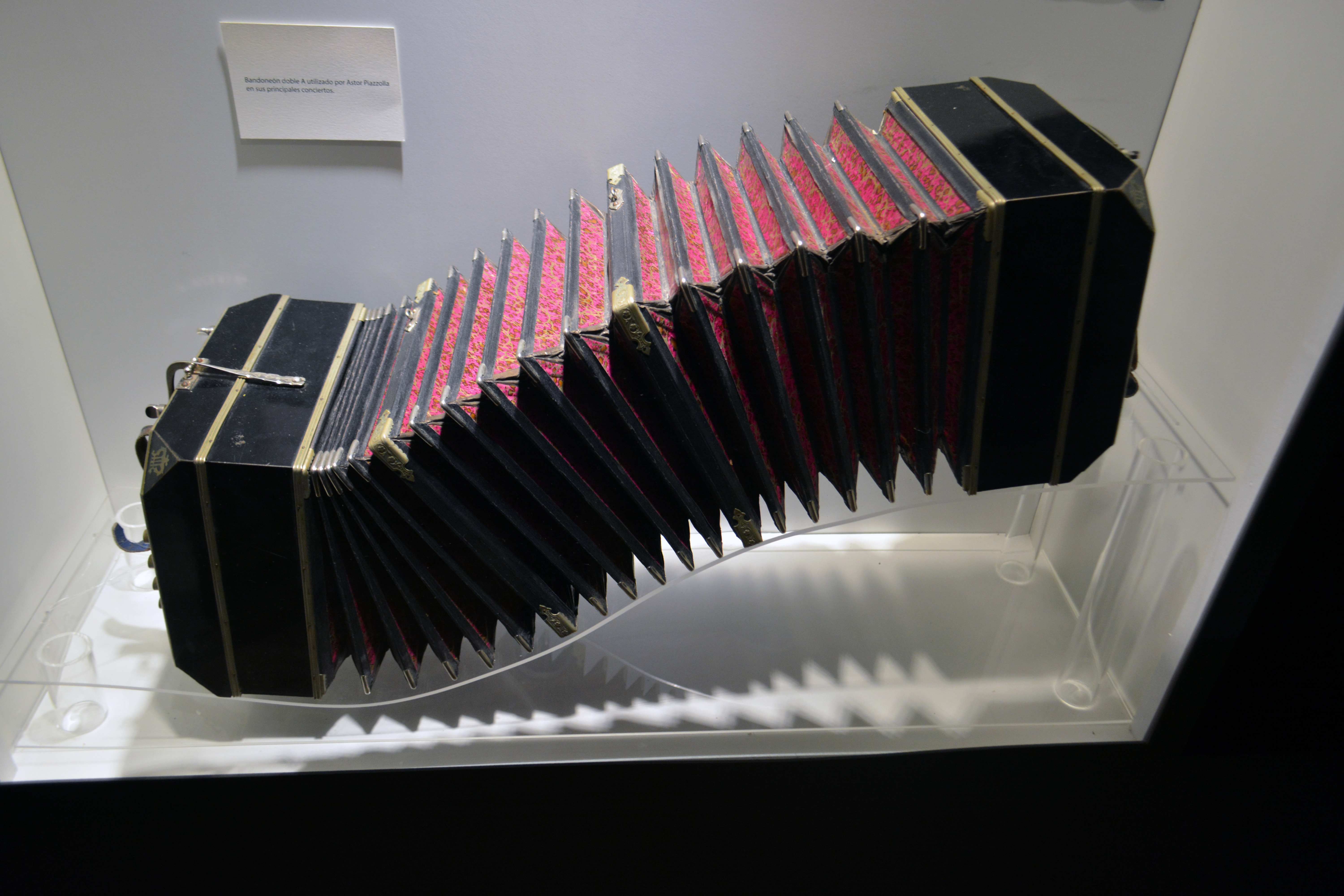 Bandoneón de Astor Piazzolla. Centro Cultural Néstor Kirchner, Buenos Aires, Argentina.